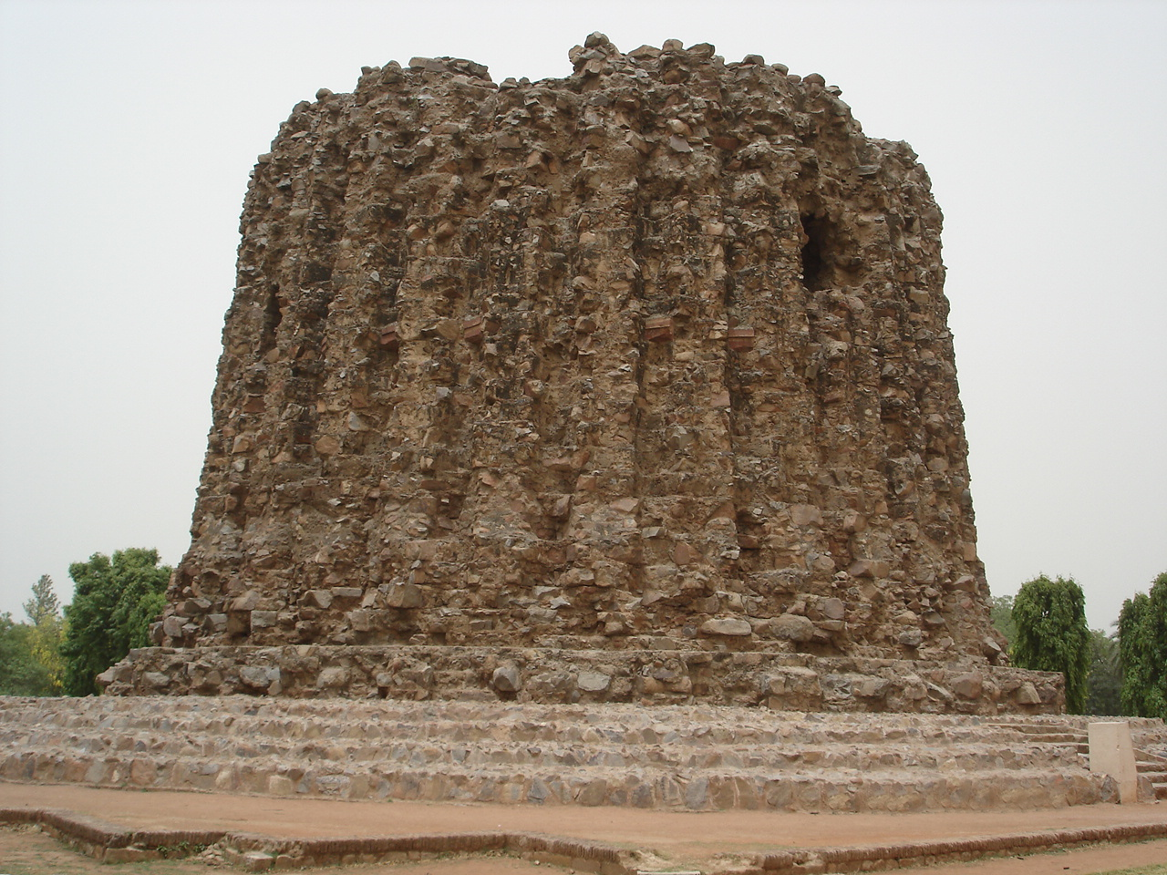 അലൈ മിനാർ